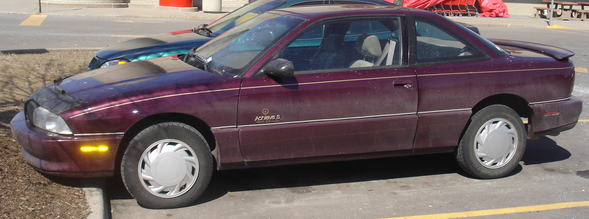 1993 Oldsmobile Achieva Coupe